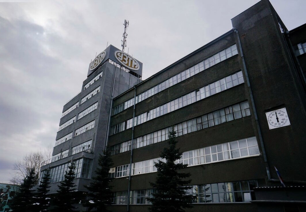 Здание УЗТМ на площади Первой пятилетки